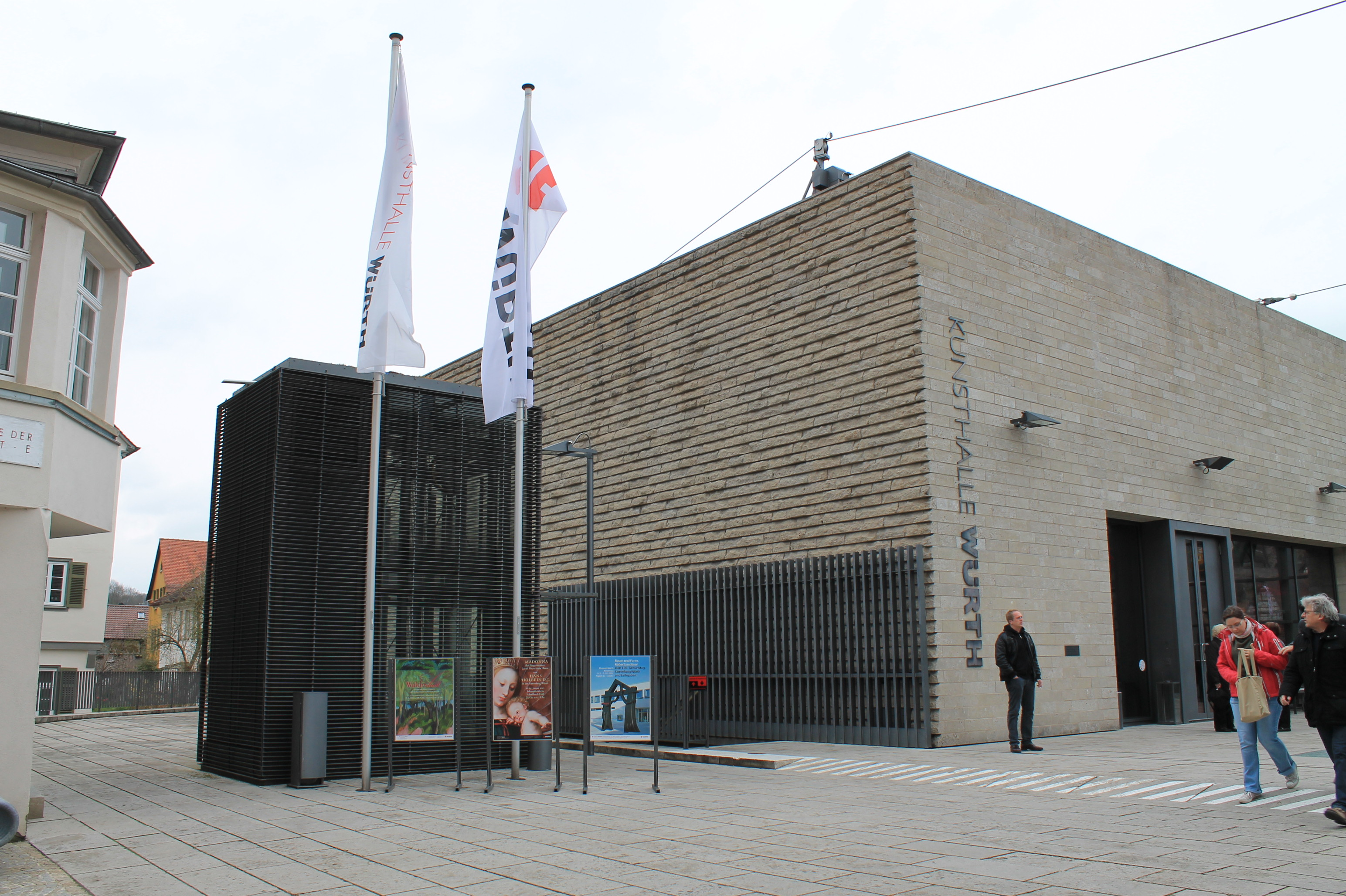 Musée "Kunsthalle Würth" Schwäbisch Hall - Oeuvres permanentes et itinérantes du Moyen Age à l'époque contemporaine